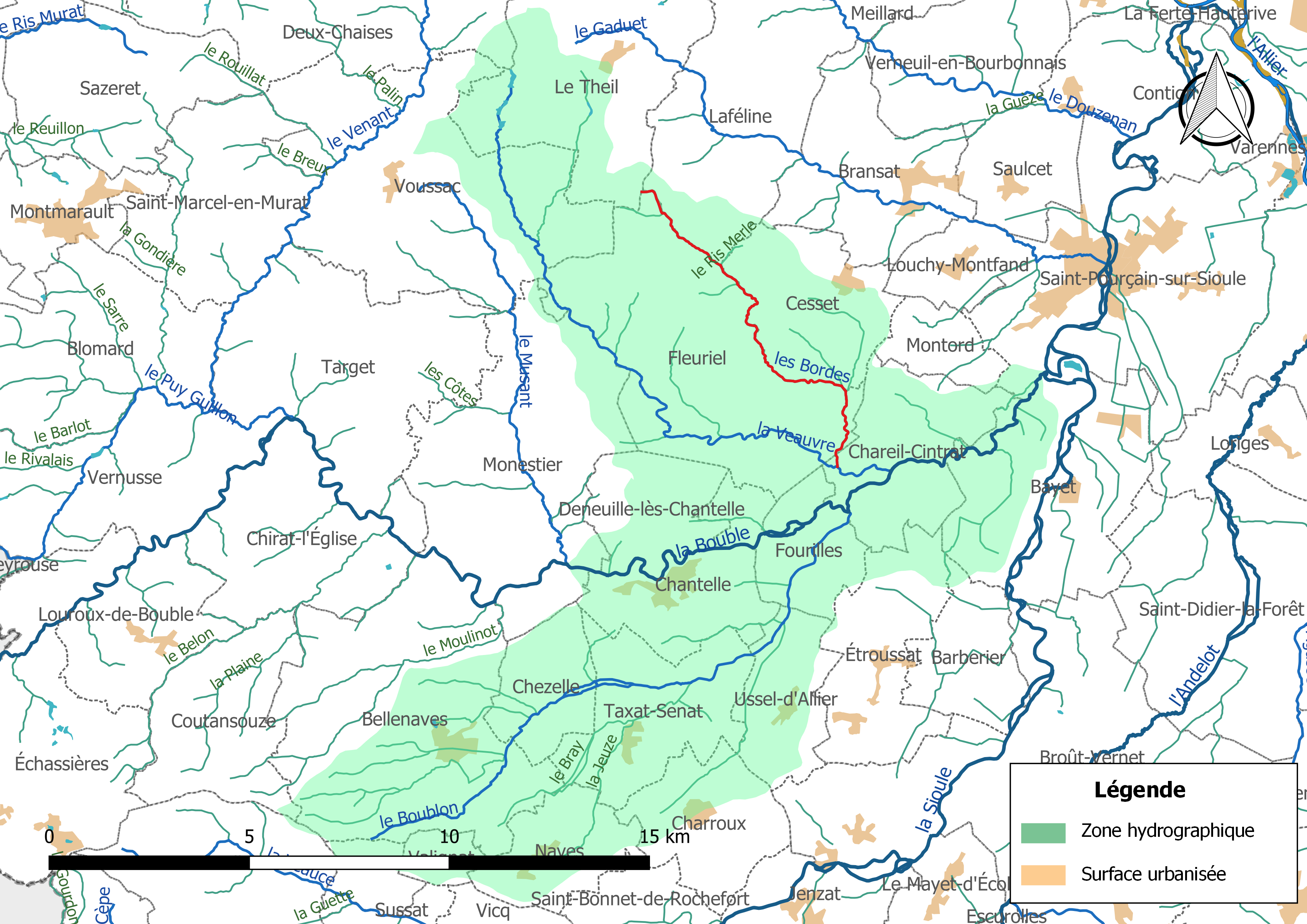 Carte du cours d'eau « les Bordes » (France) et de la zone hydrographique dans laquelle il s'insère.